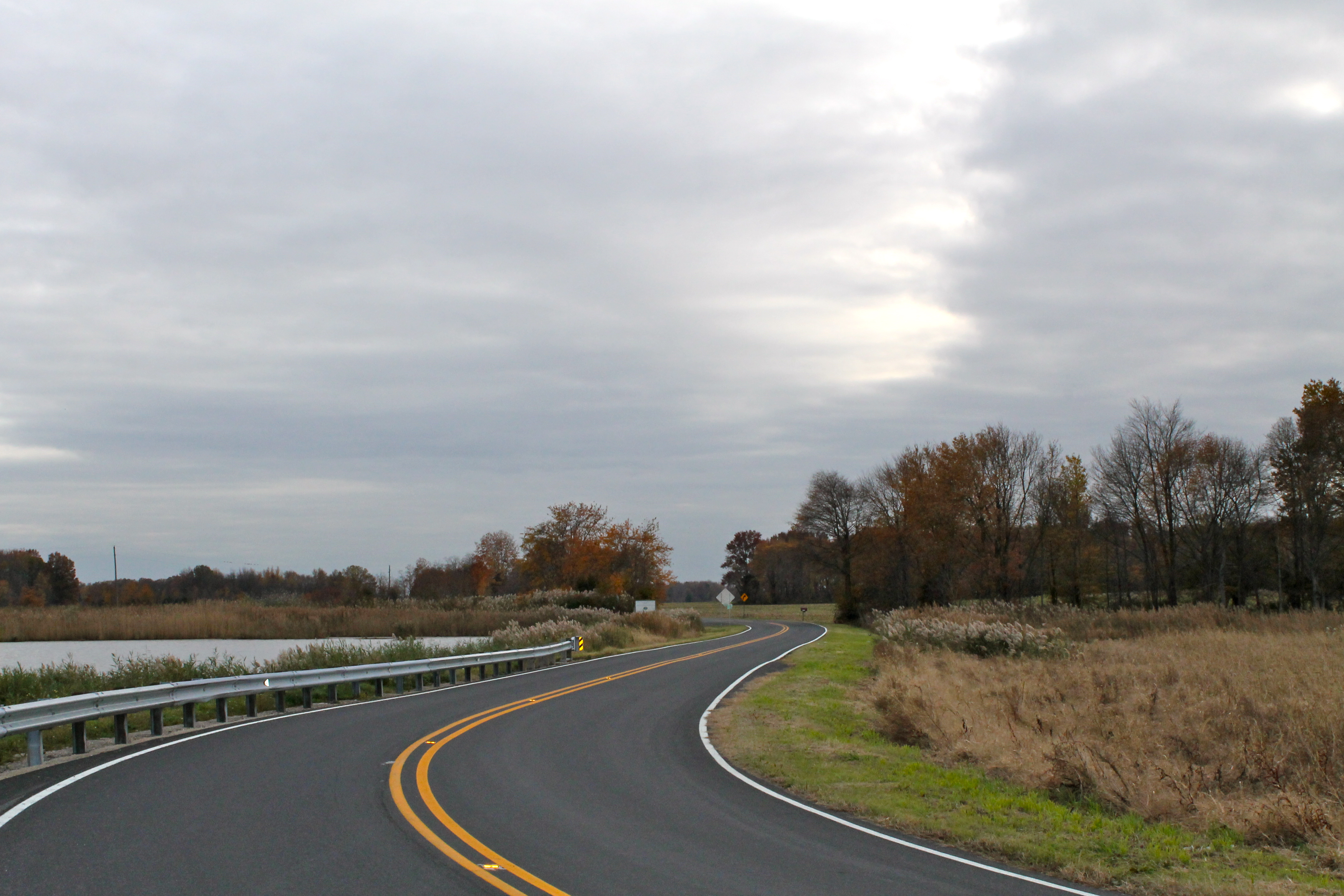 Smyrna